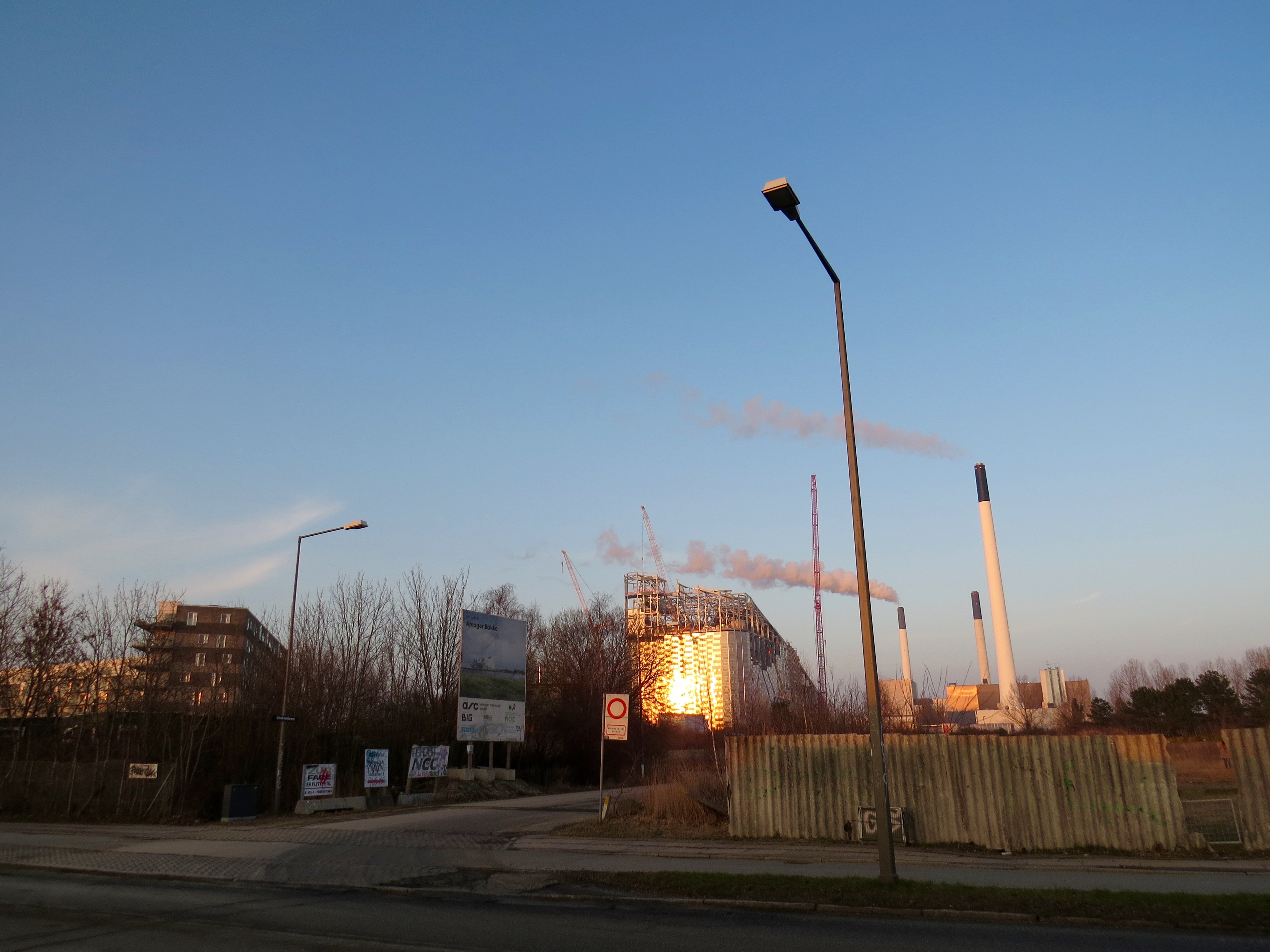 Opføring af Amager Bakke, Amager